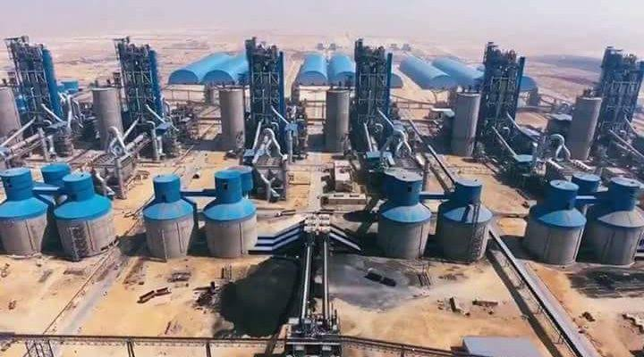 مصنع الاسمنت ببني سويف